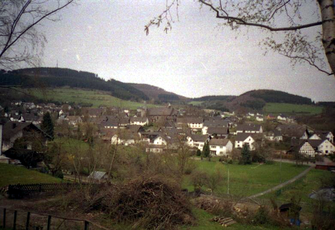 Hesborn (Hallenberg, Hochsauerlandkreis) Ortsansicht mit Kirche und Bollerberg (links)